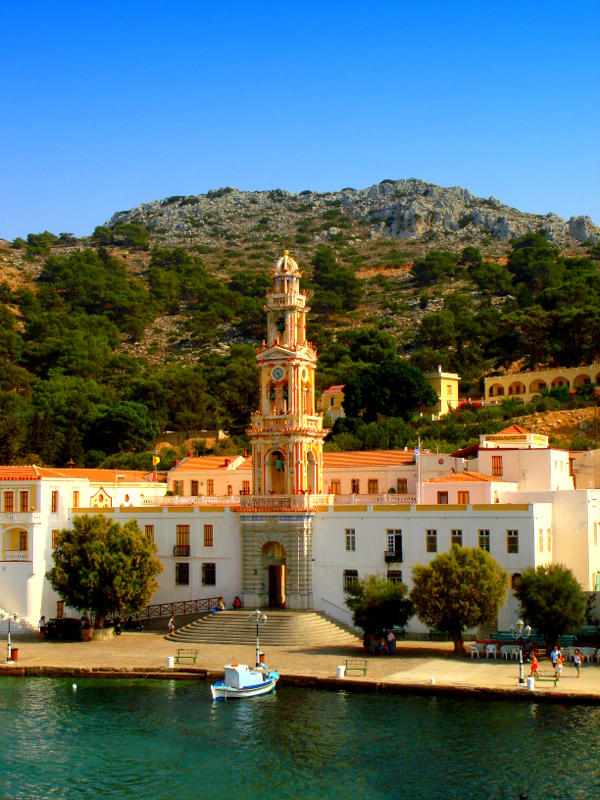 Simi, klasztor Świętego Michała nad Zatoką Panormitis